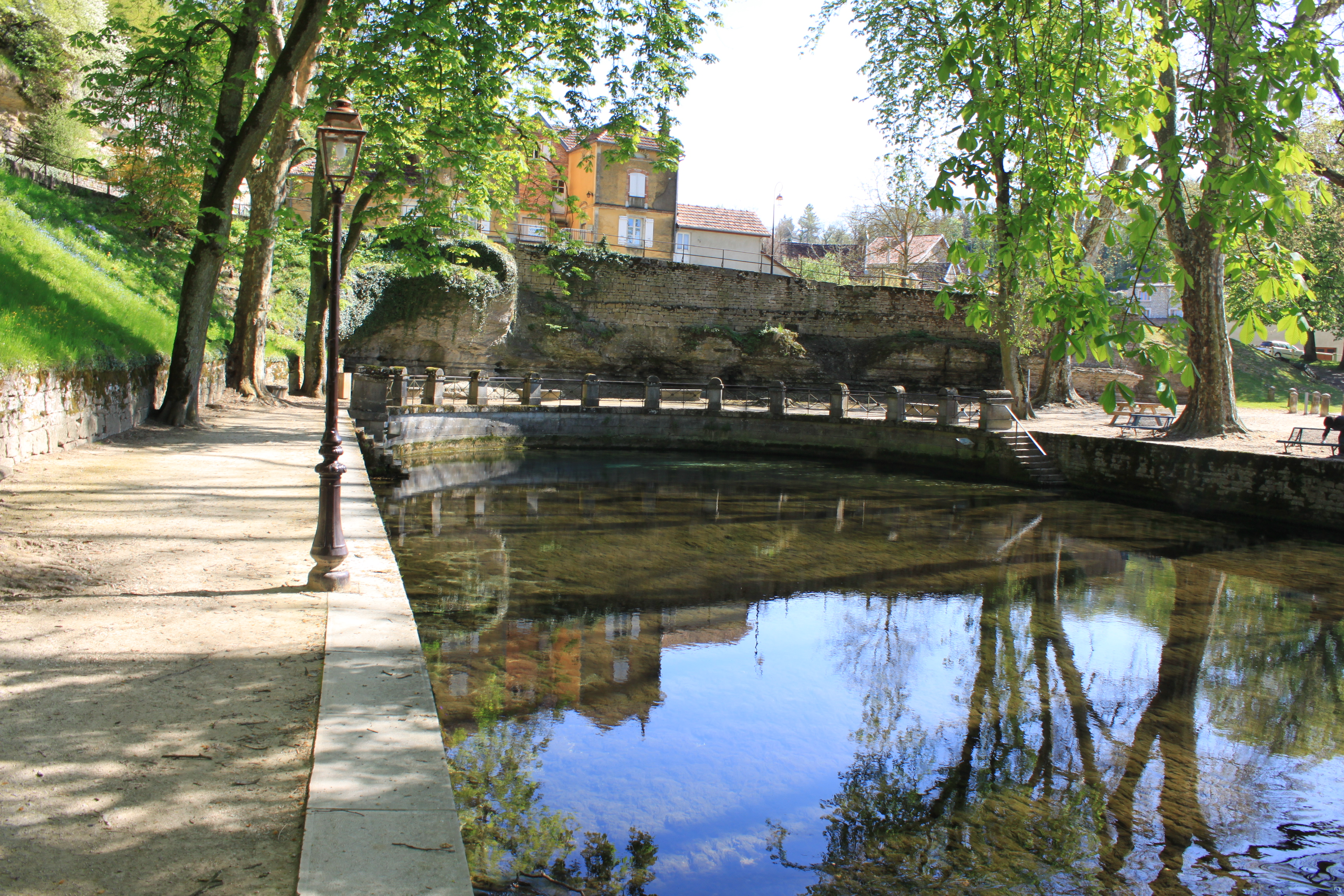 Bèze, Bourgogne, FRANCE